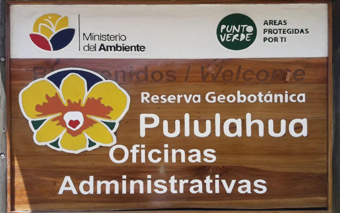 Pululahua - Reserva Geobotánica